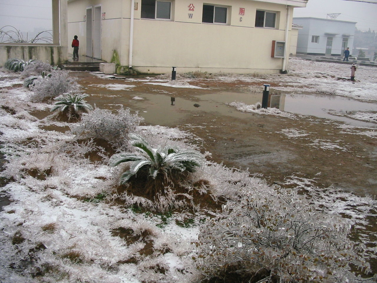 2008年中国南方雪灾时植物结冰